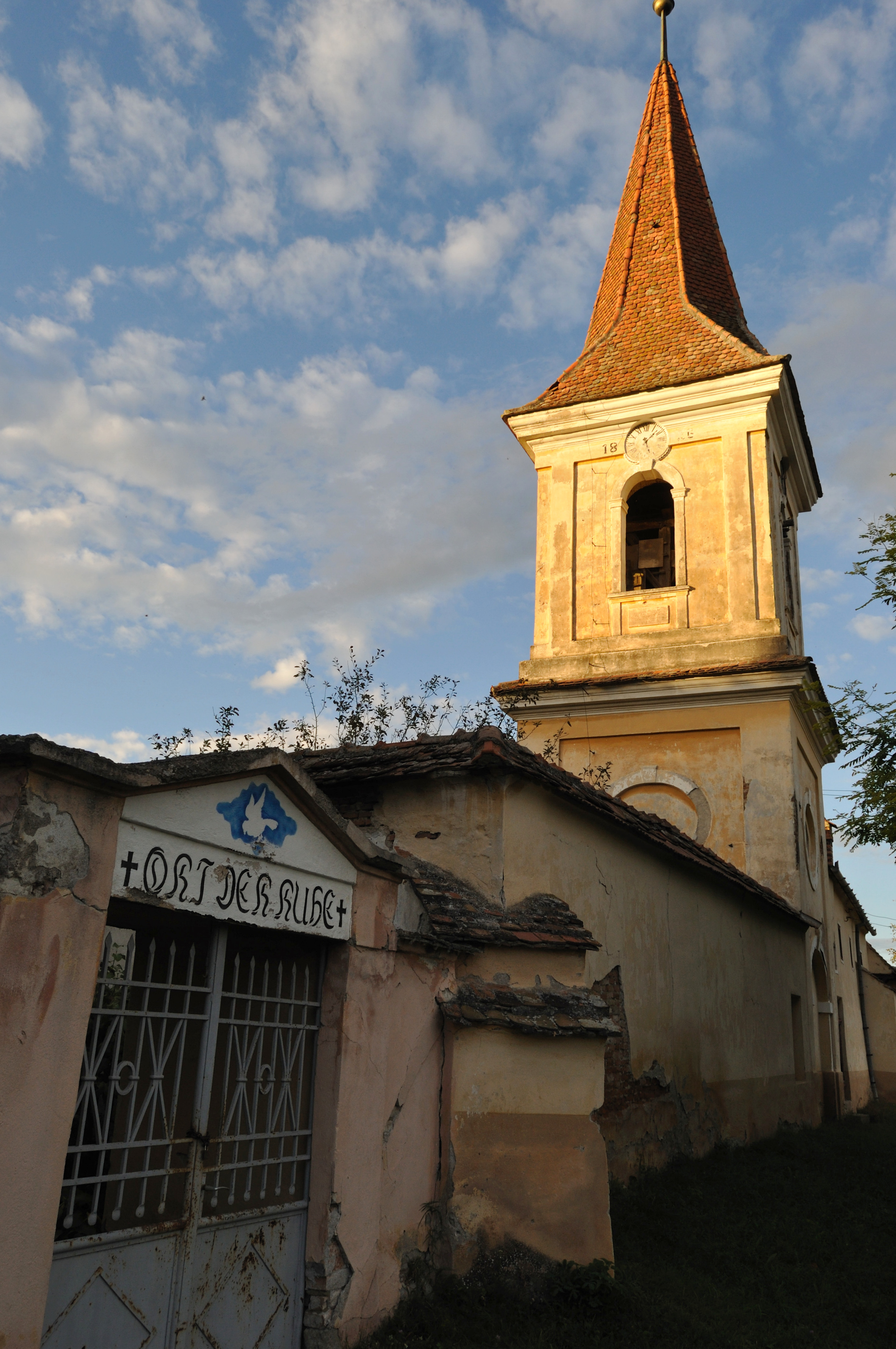 Biserica evanghelică fortificată din Șona